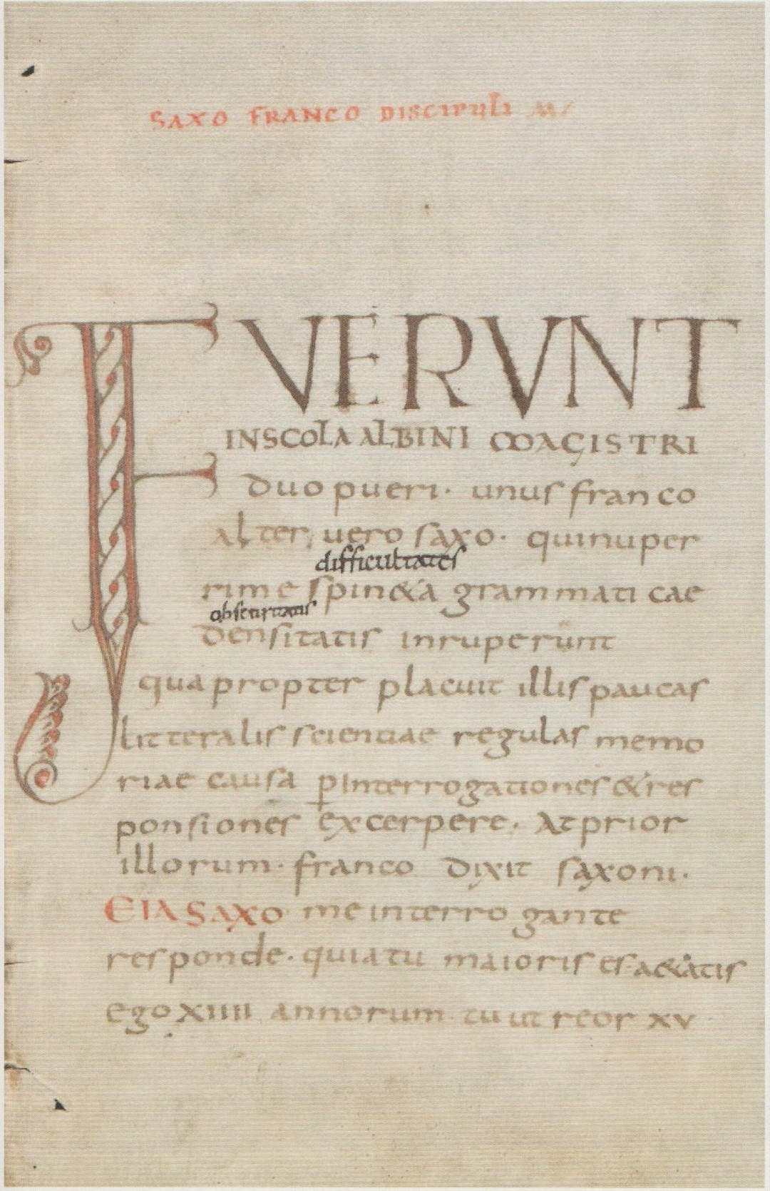 Alcuino di York, manuale di grammatica. Copia più antica.